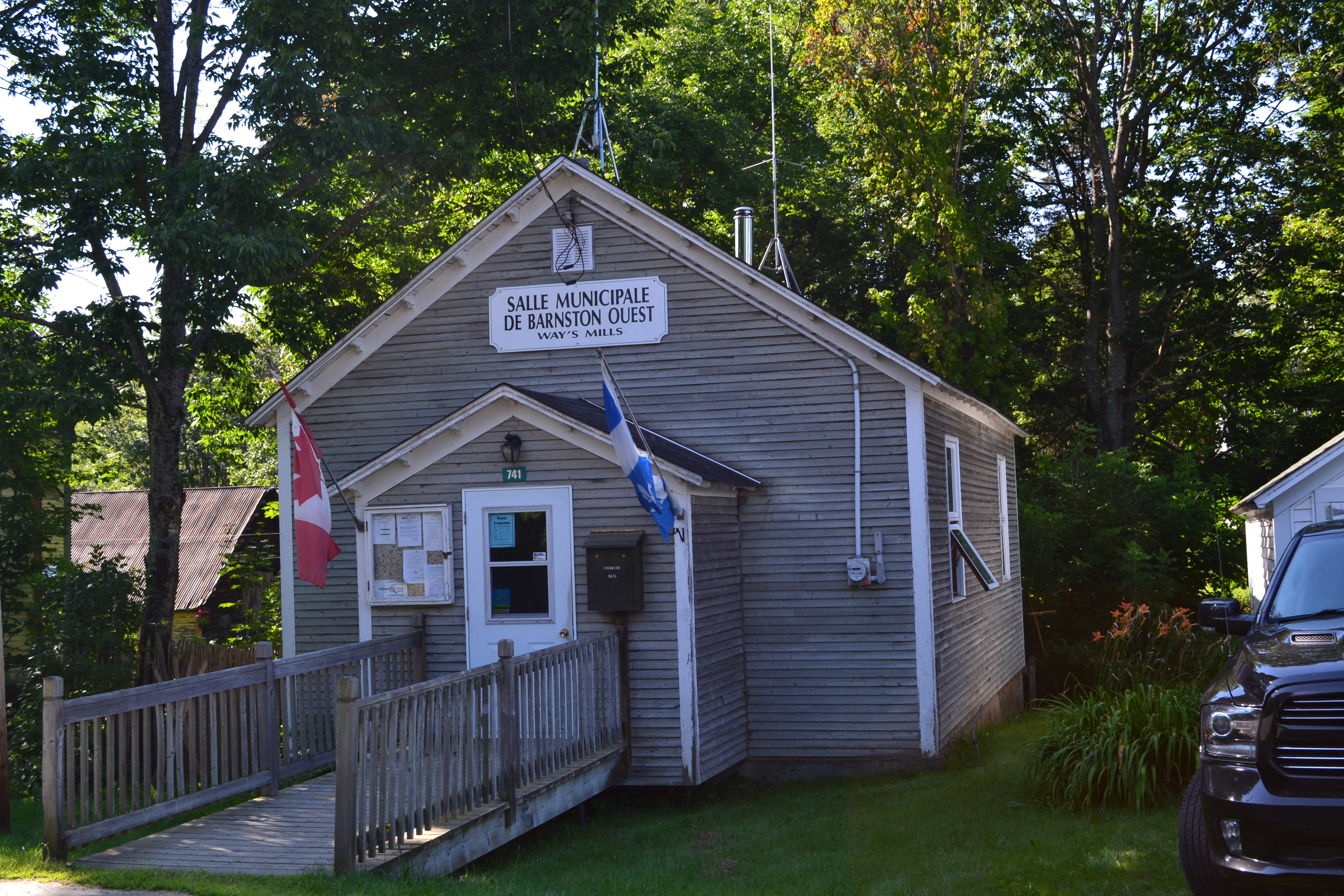 Bureau municipal (ou salle municipale) sis au 741, chemin Hunter (consulter la carte plus bas) dans le hameau de Way's Mills à Barnston-Ouest au Québec